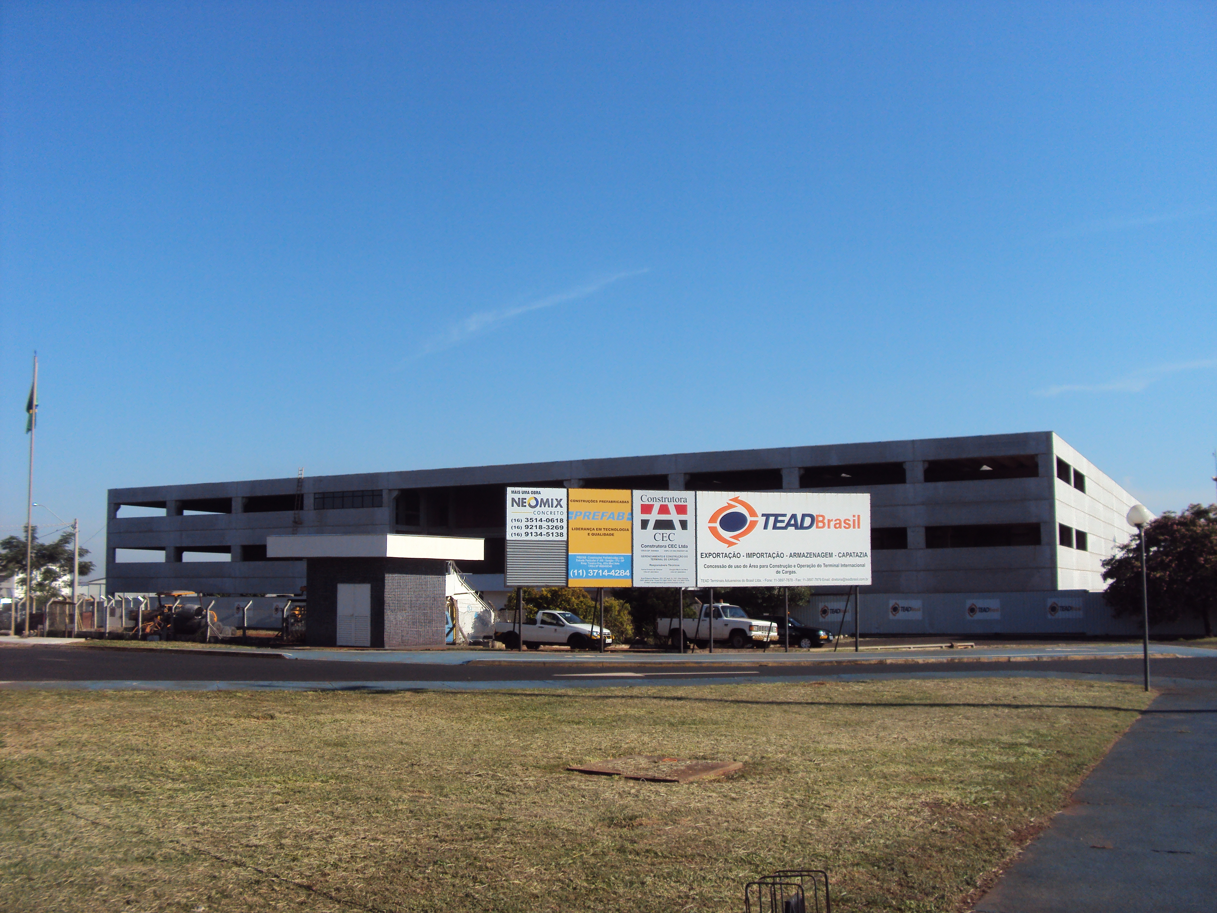 Construção do Terminal de Cargas no Aeroporto Leite Lopes, que será operado pela TEAD Brasil.